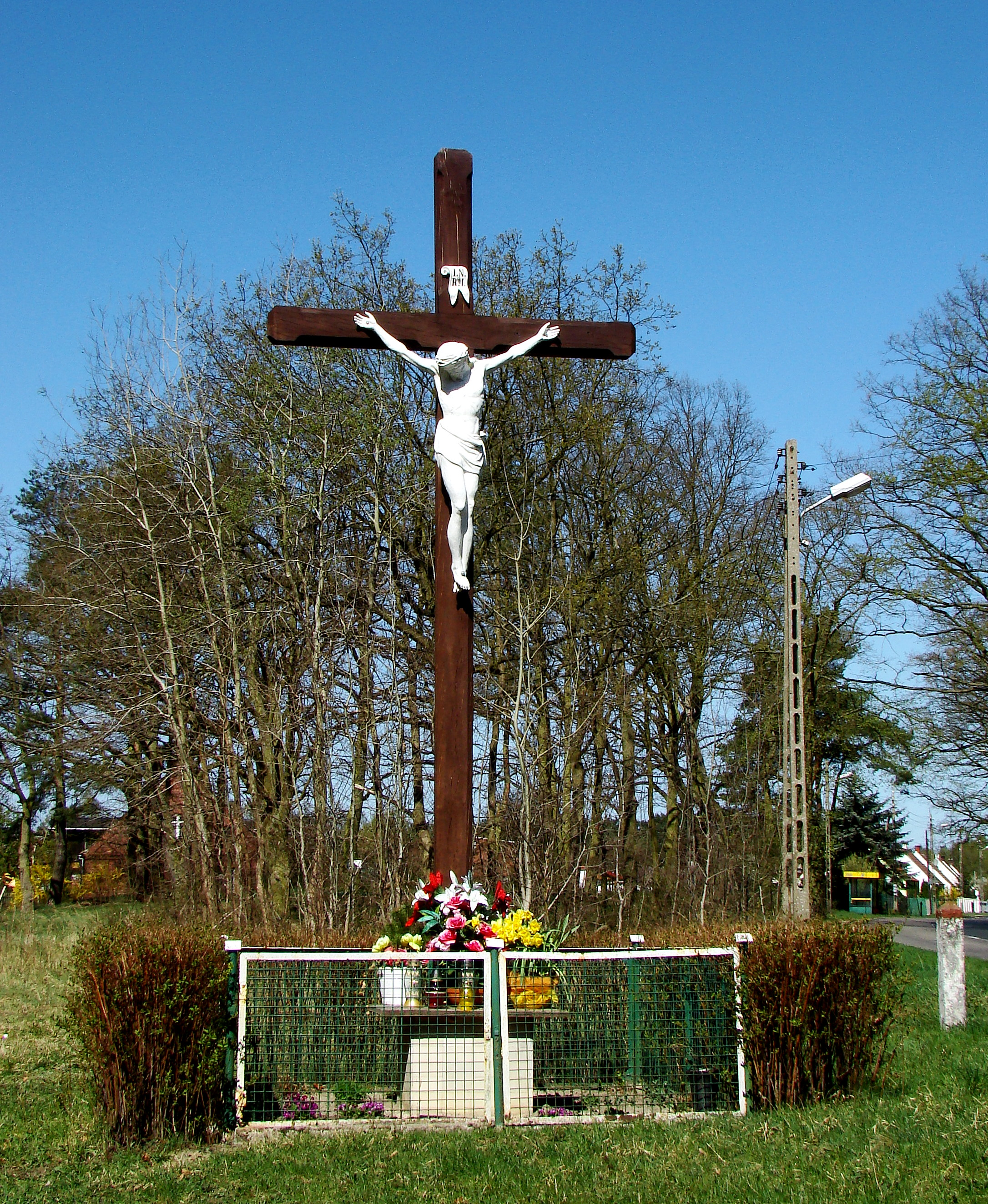 Dębostrów, przydrożny krzyż we wsi, (Gmina Police, Województwo zachodniopomorskie), Polska